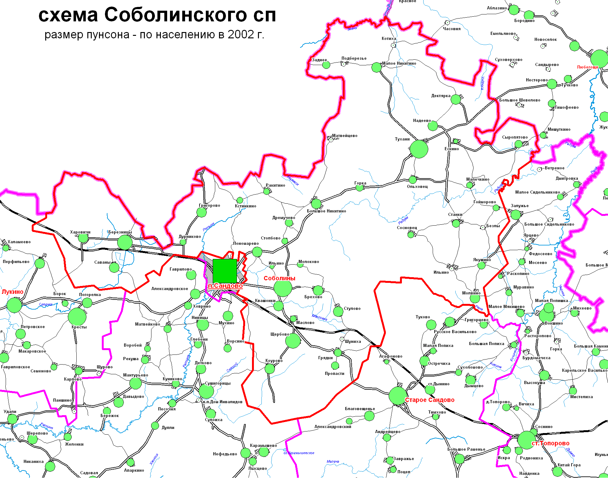 Схема Соболинского сп